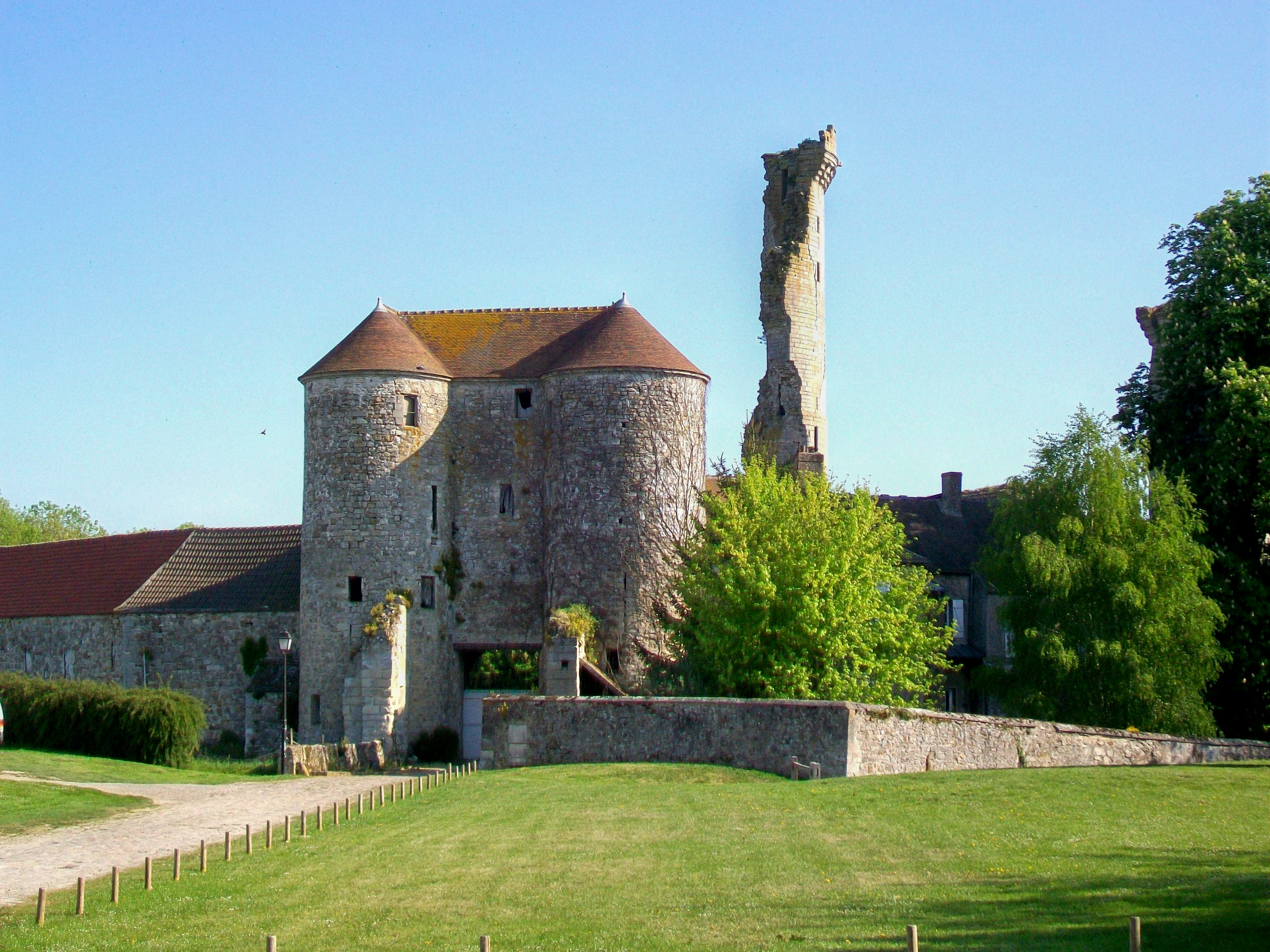 Les ruines de l'ancien château, qui comprennent : les deux tours autour de l'entrée avec les vestiges du pont-levis ; l'enceinte (dont l'hauteur a été réduite) ; la ruine du donjon (l'épine au centre de la photo) ; les ruines du logis (partiellement visibles à droite, cachées derrière la végétation).